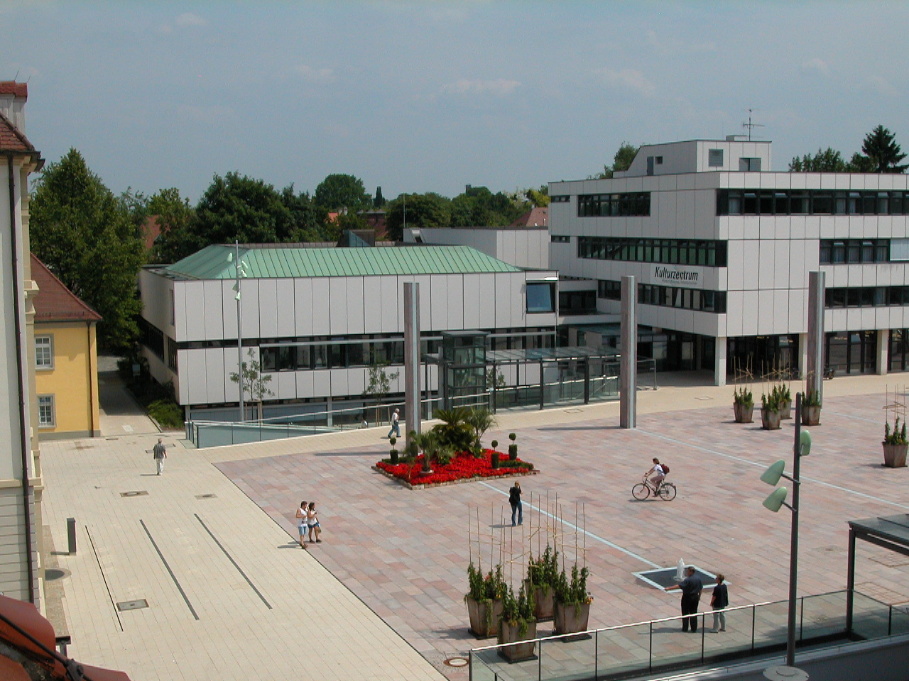 Das Ludwigsburger Kulturzentrum von außen